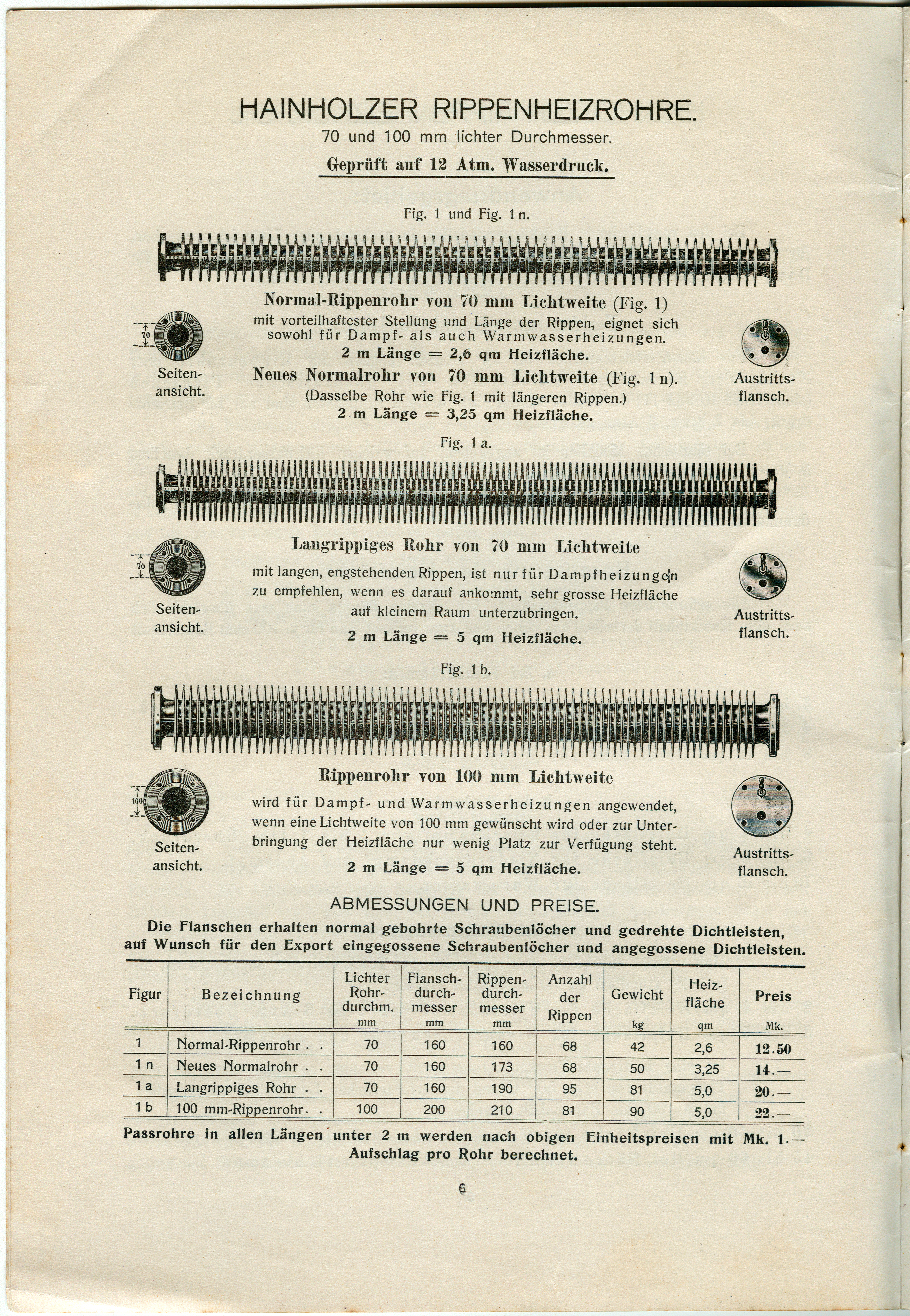 Seite 6 des Kataloges ("Liste 101") von 1913 der Centralheizungswerke AG mit Sitz in Hannover-Hainholz und Wien ...